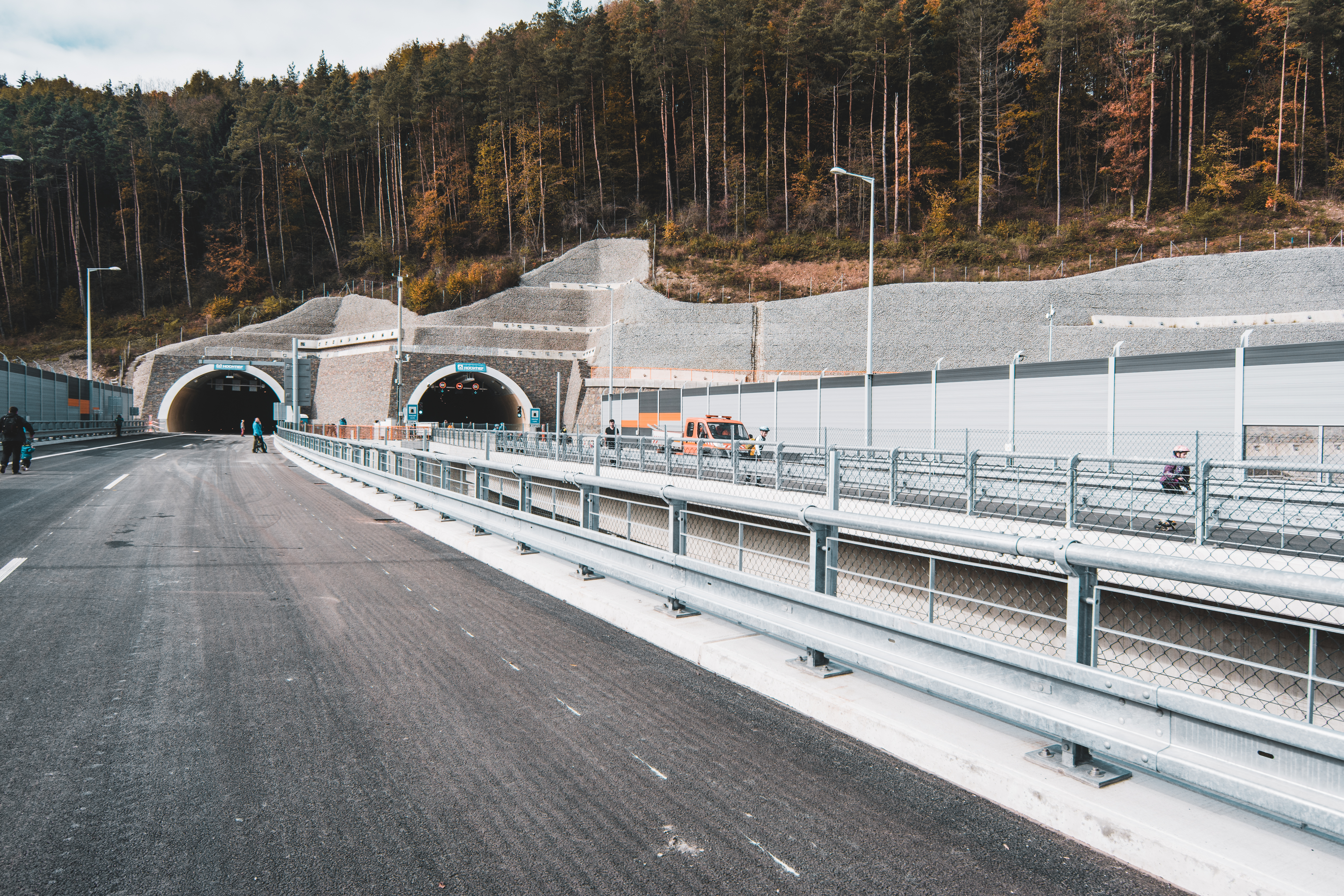 Povazsky Chlmec